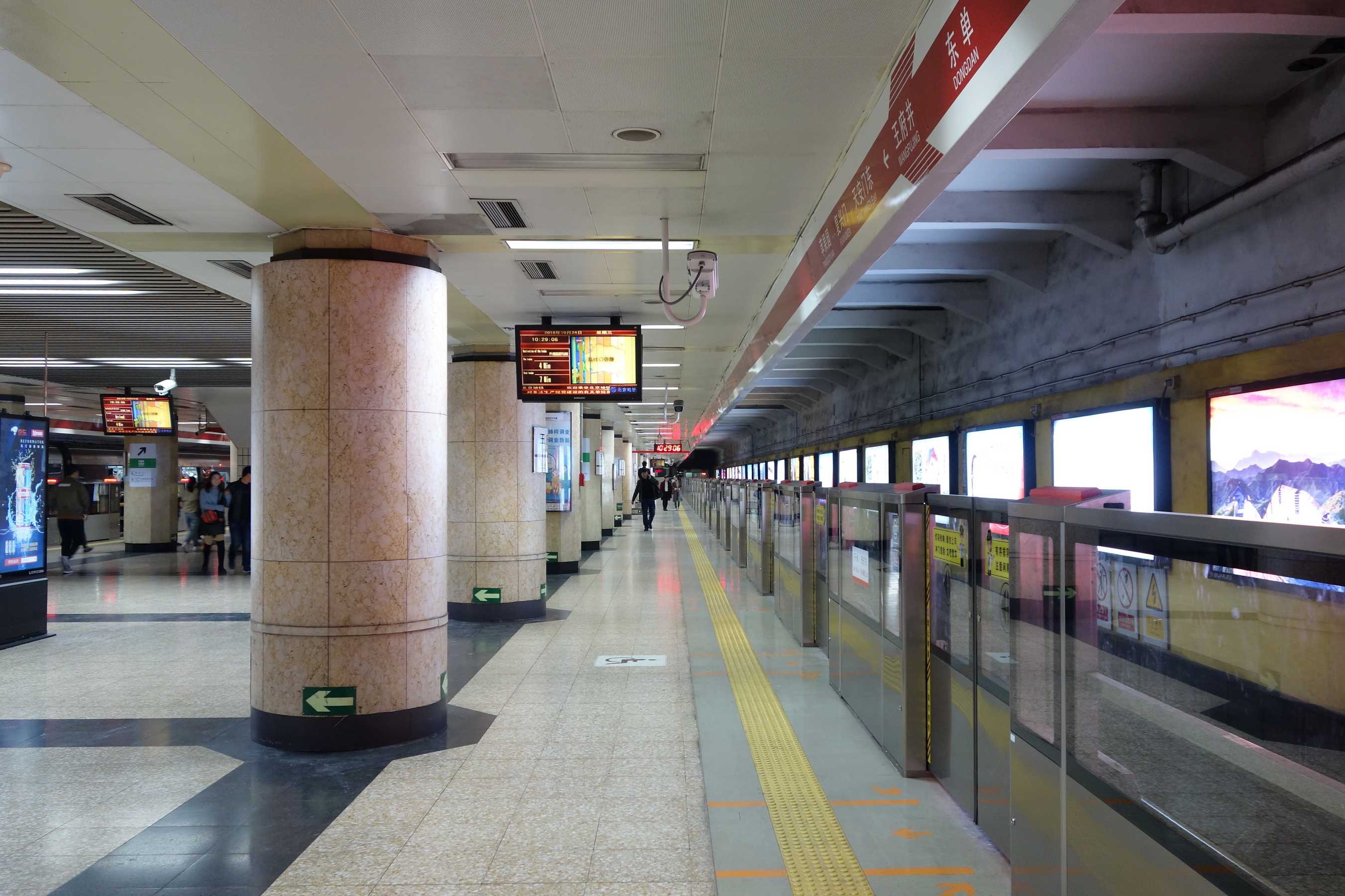 北京地铁1号线王府井站站台，站台加装半高式屏蔽门，2017年投入使用。